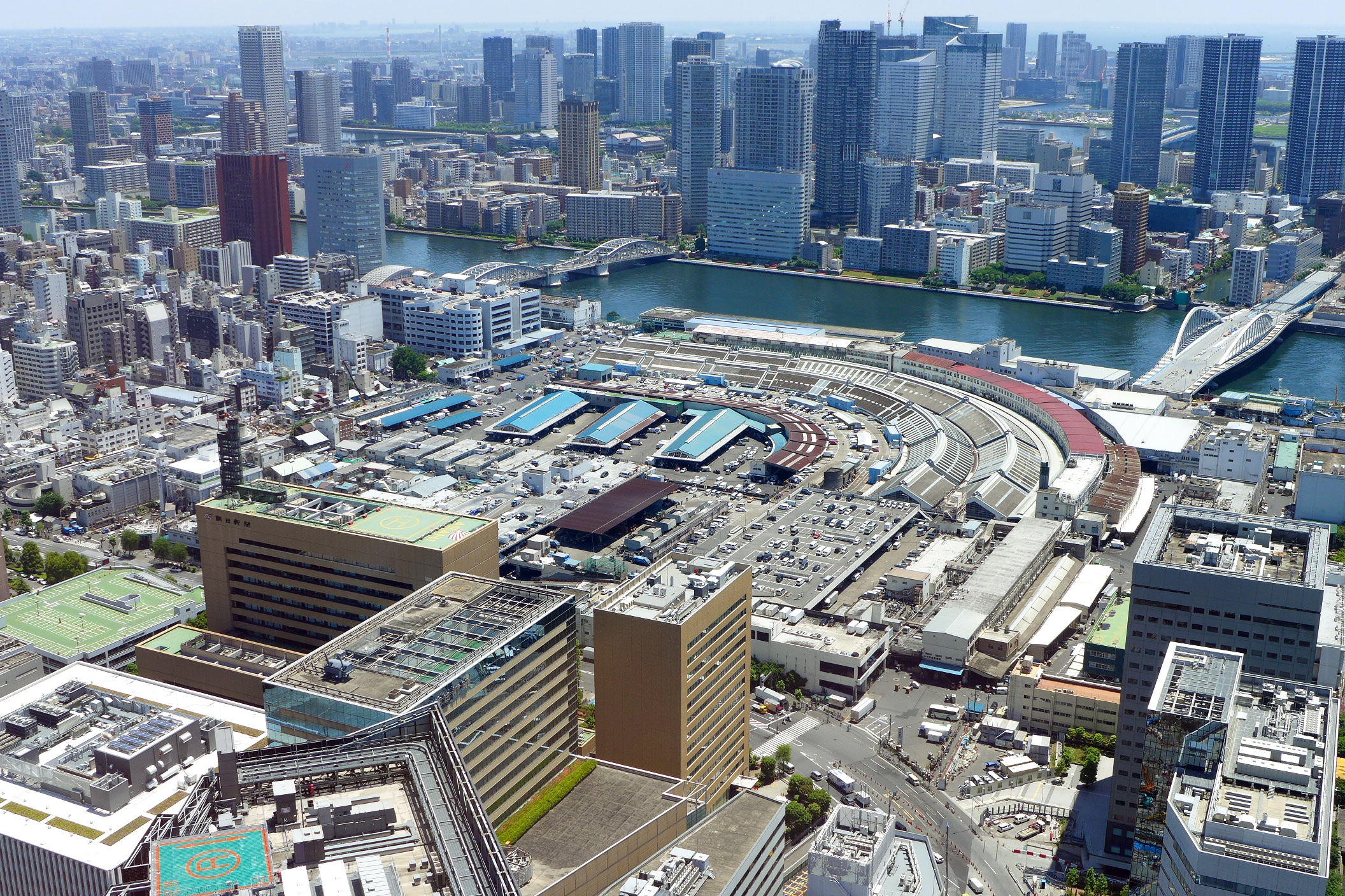 Tsukiji